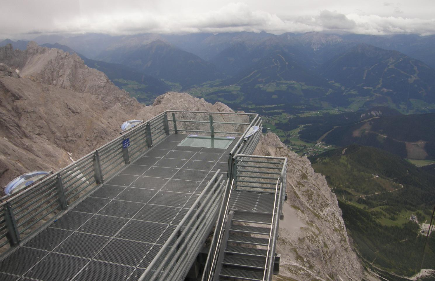 Dachstein Skywalk